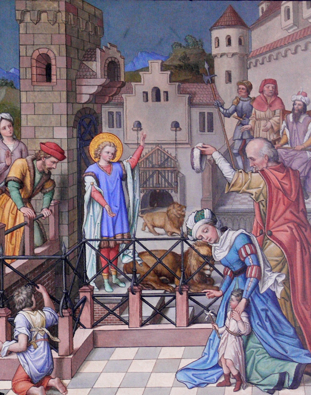 Filialkirche St. Venantius, Pfärrenbach, Gemeinde Horgenzell Wandgemälde im Kirchenschiff: Venantiuslegende